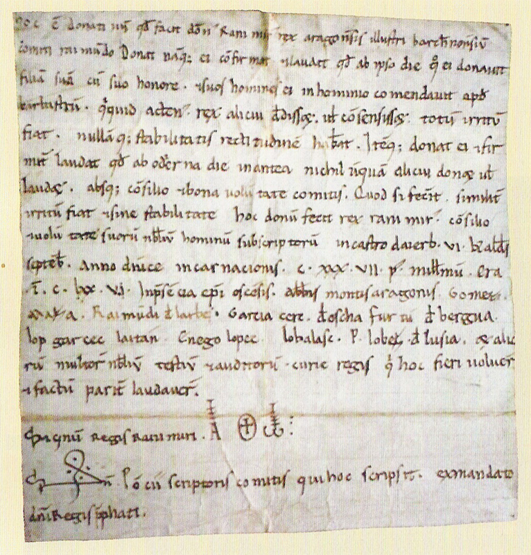 Confirmació d'Ayerbe. 27 d'agost de 1137 Hoc est donativum quod facit domnus ac venerabilis Rammirus, rex aragonensis, illustri barchinonensium comiti Raimundo. Donat namque, ei, confirmat et laudat quod ab hac ipso die, ex quo ei donavit filiam suam cum suo honore, et suos homines ei in hominio comendavit apud Barbastrum, quicquid actenus rex alicui dedisset vel consensisset, totum irritum fiat nullamque stabilitatis rectitudinem habeat. Itemque, donat ei et firmiter laudat quod ab odierna die in antea nichil unquam alicui donet vel laudet absque consilio et bona voluntate comitis; quod, si fecerit, similiter irritum et sine stabilitate fiat. Hoc donum fecit rex Rammirus consilio et voluntate suorum nobilium hominum subscriptorum in castro d'Eierb, VI kalendas septembris anno Dominice incarnacionis C XXXVII post millessimum, era M C LXXV. [In presencia] episcopus oscensis, abbas Montis Aragoni, Gomez, Maza, Raimundi de Larbes, Garcia Cez de Oscha, Frontinus, Fruntun de Bergua, Lop Garcez Laitia, Enego Lobez, Lob Balasch, Garcia Ces, Petro Lobiz de Lusia, et alii plurimi curie regis nobiles homines, testes et auditores, qui hoc fieri voluerunt, et factum pariter laudaverunt. Hoc totum facio propter multas decepciones et fraudes, quas a multis sum passus et, ne mihi ulterius fiant, hunc modum imposui. Signum regis + Rammiri. Sig+num Poncii scriptoris comitis, qui hoc scripsit ex mandato domini regis prephati.